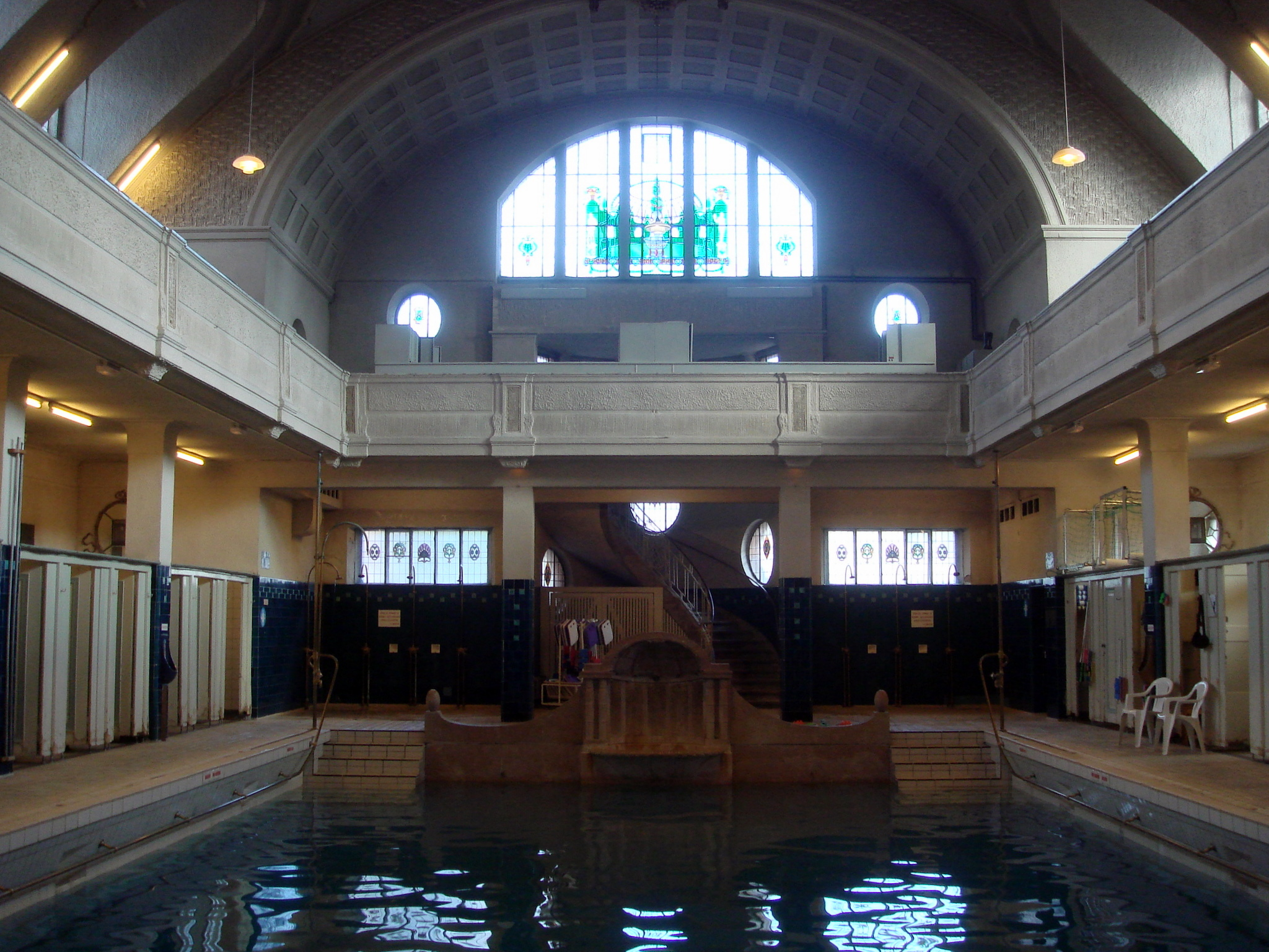 Petit bain - anciennement le bassin de natation pour dames. .